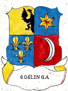 Wappen derer van Goslinga, einem friesischen Adelsgeschlecht